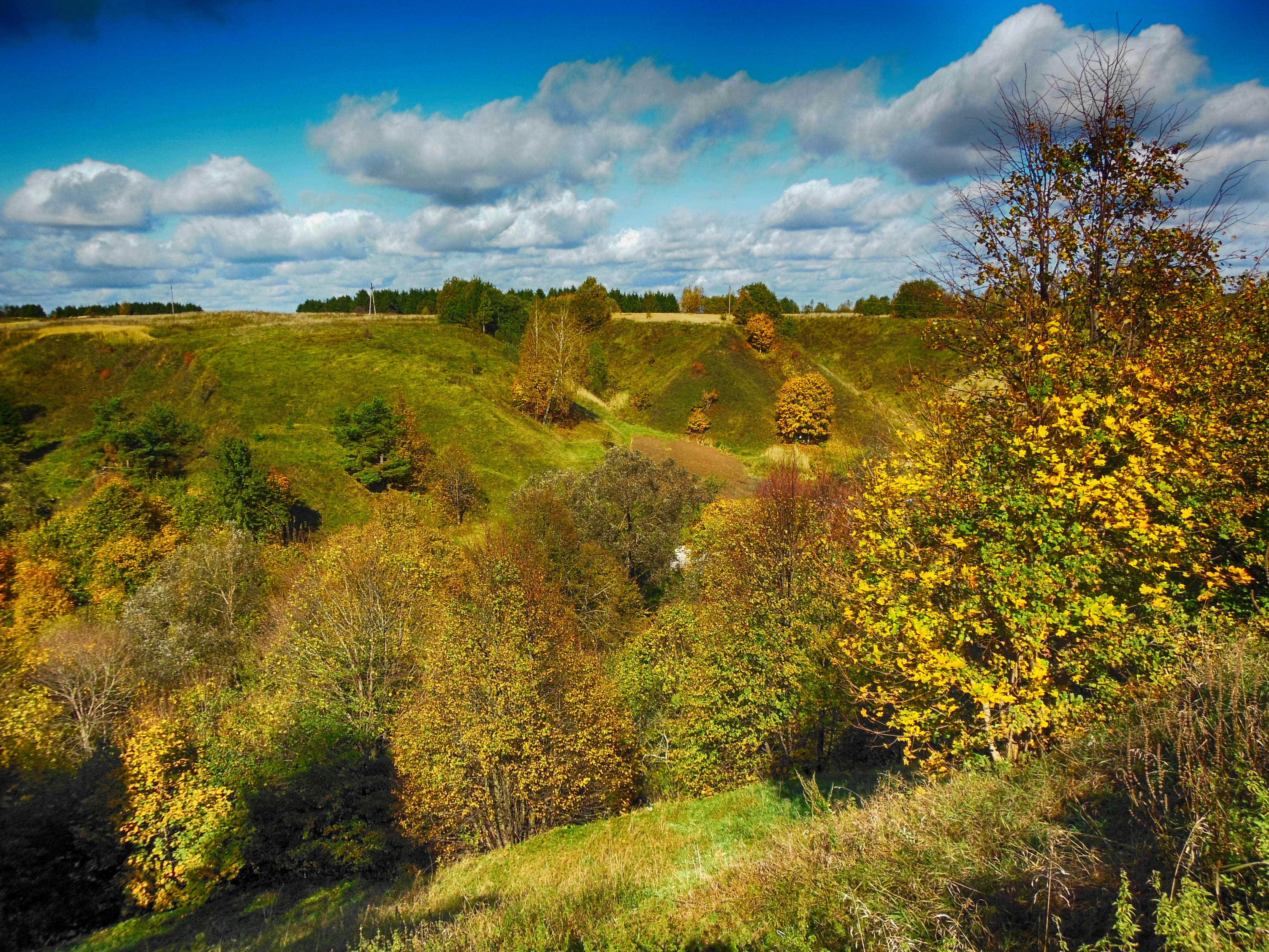 Беларуская (тарашкевіца): Мсьціслаў, краявід з Замкавай гары